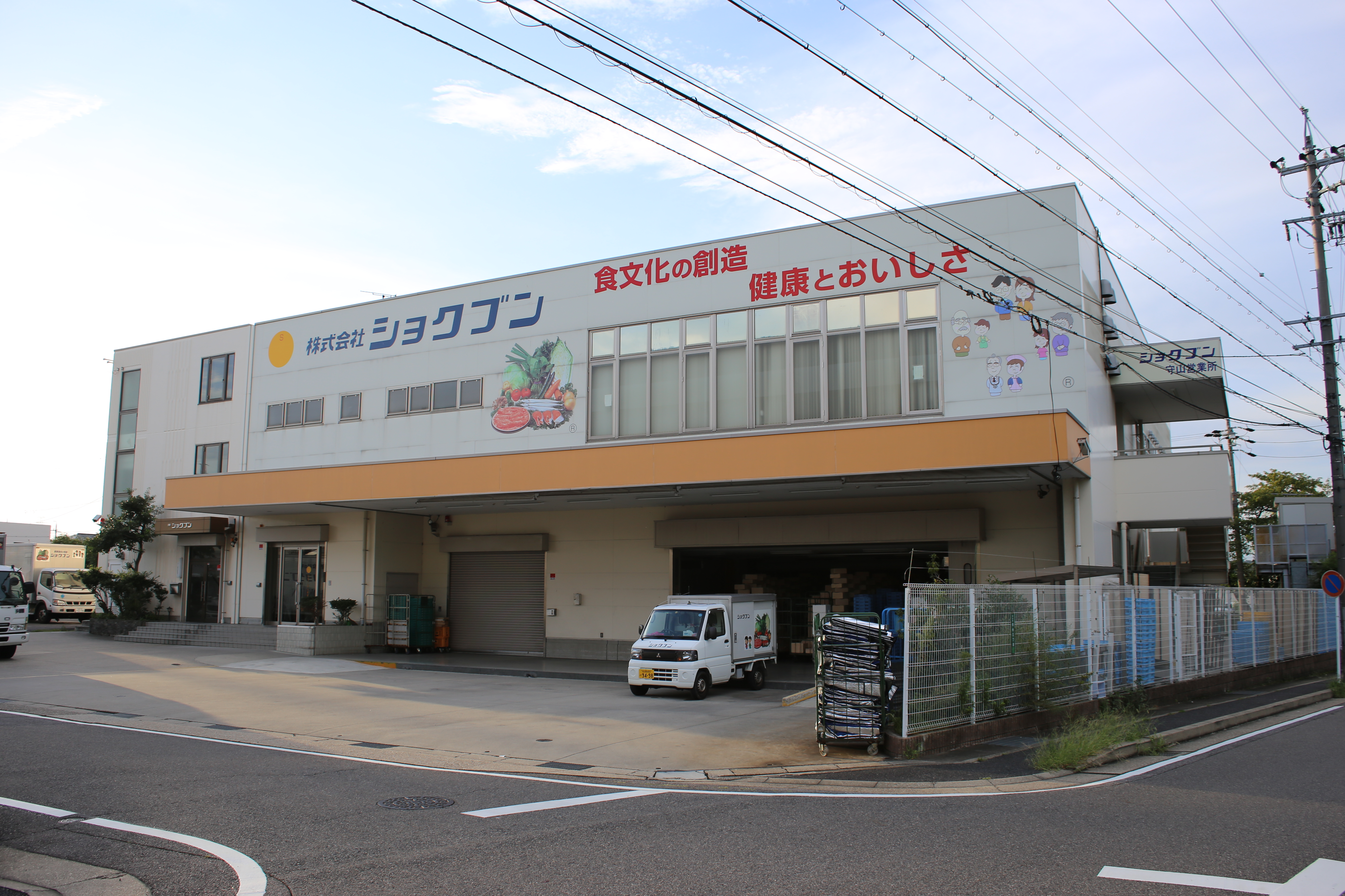 名古屋市守山区向台3丁目のショクブン本社を東側公道南側より撮影